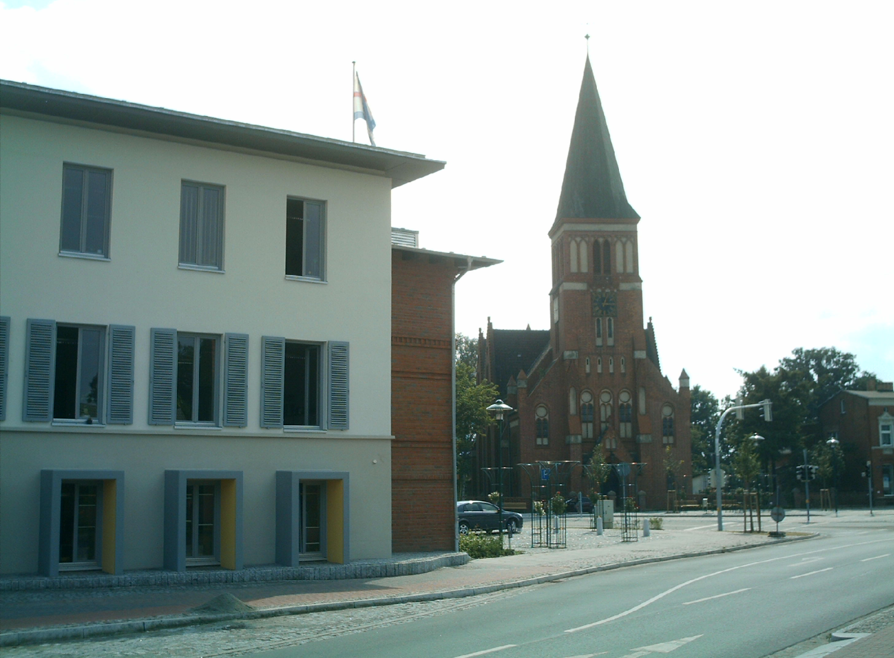 Eggesin, Luther-Kirche mit neugestalteter Fassade des Rathauses